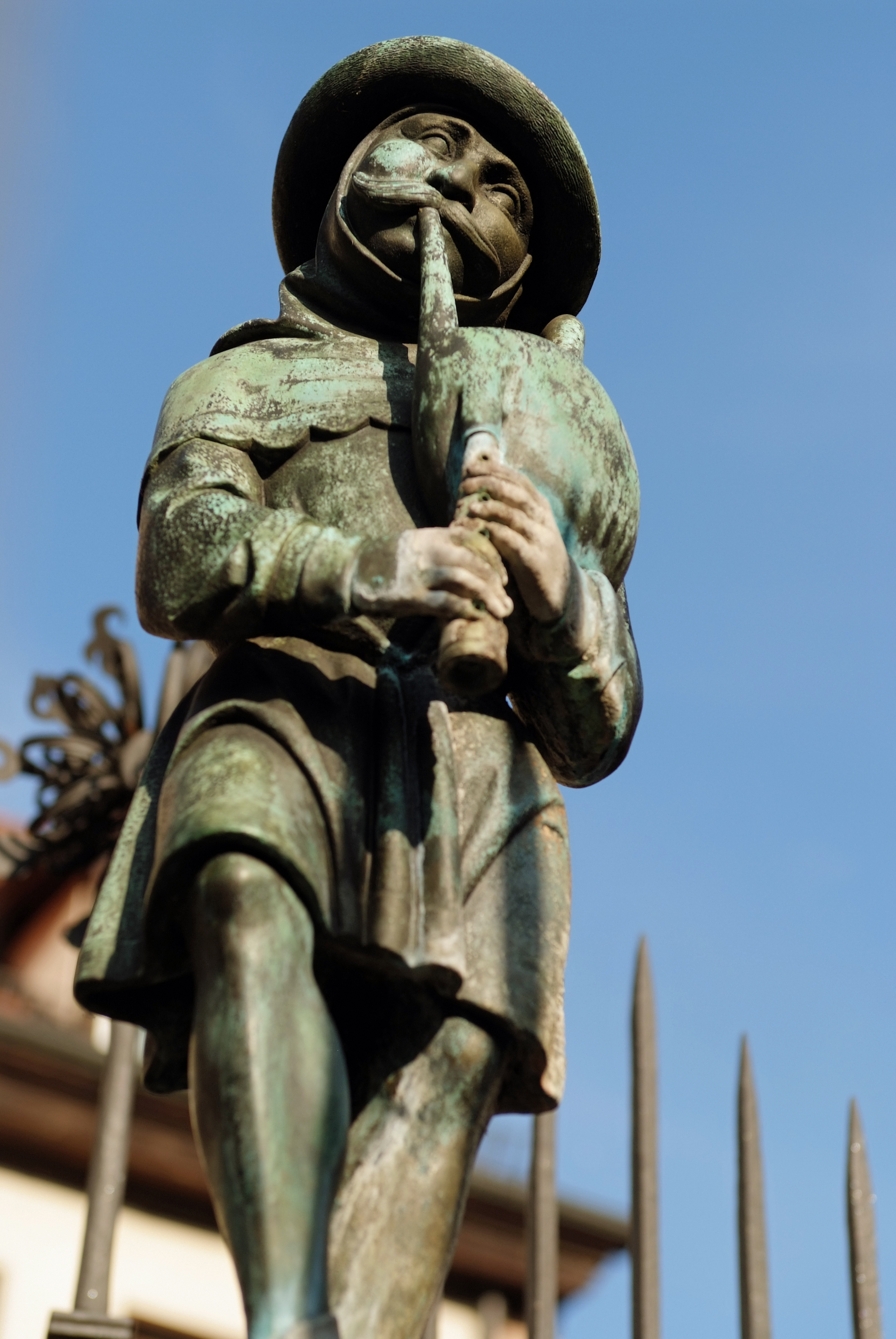 Nürnberg Figur am Dudelsackpfeiferbrunnen, Nürnberg